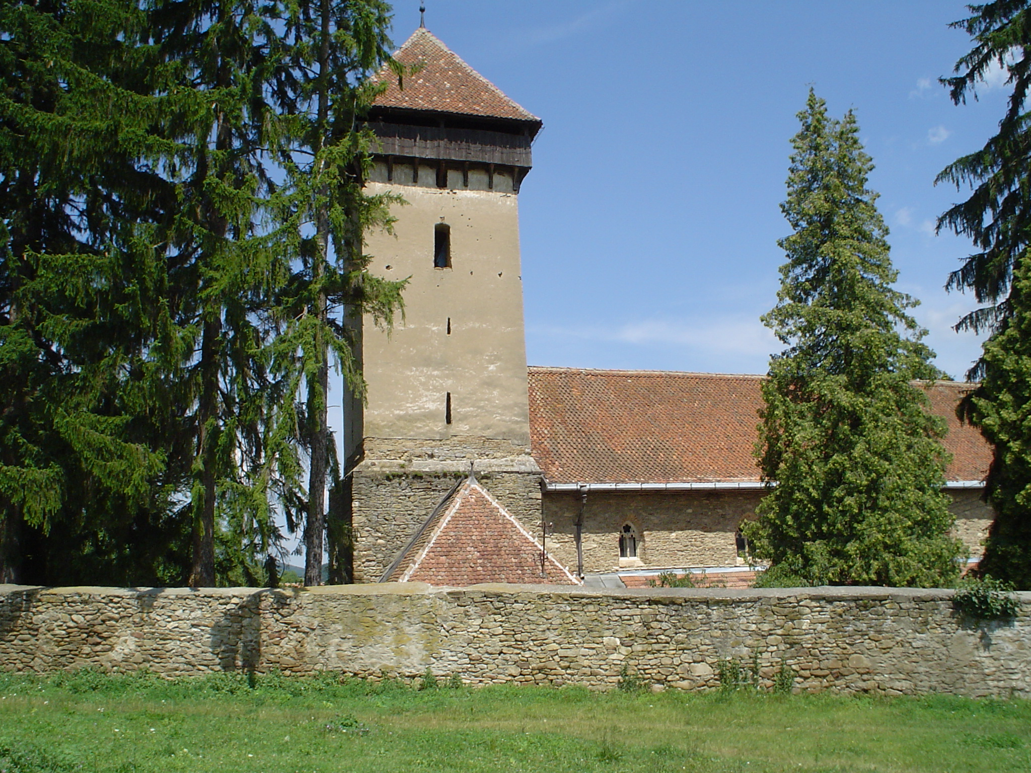 Mălâncrav, Transylvania, Romania: Saxon fortified church.